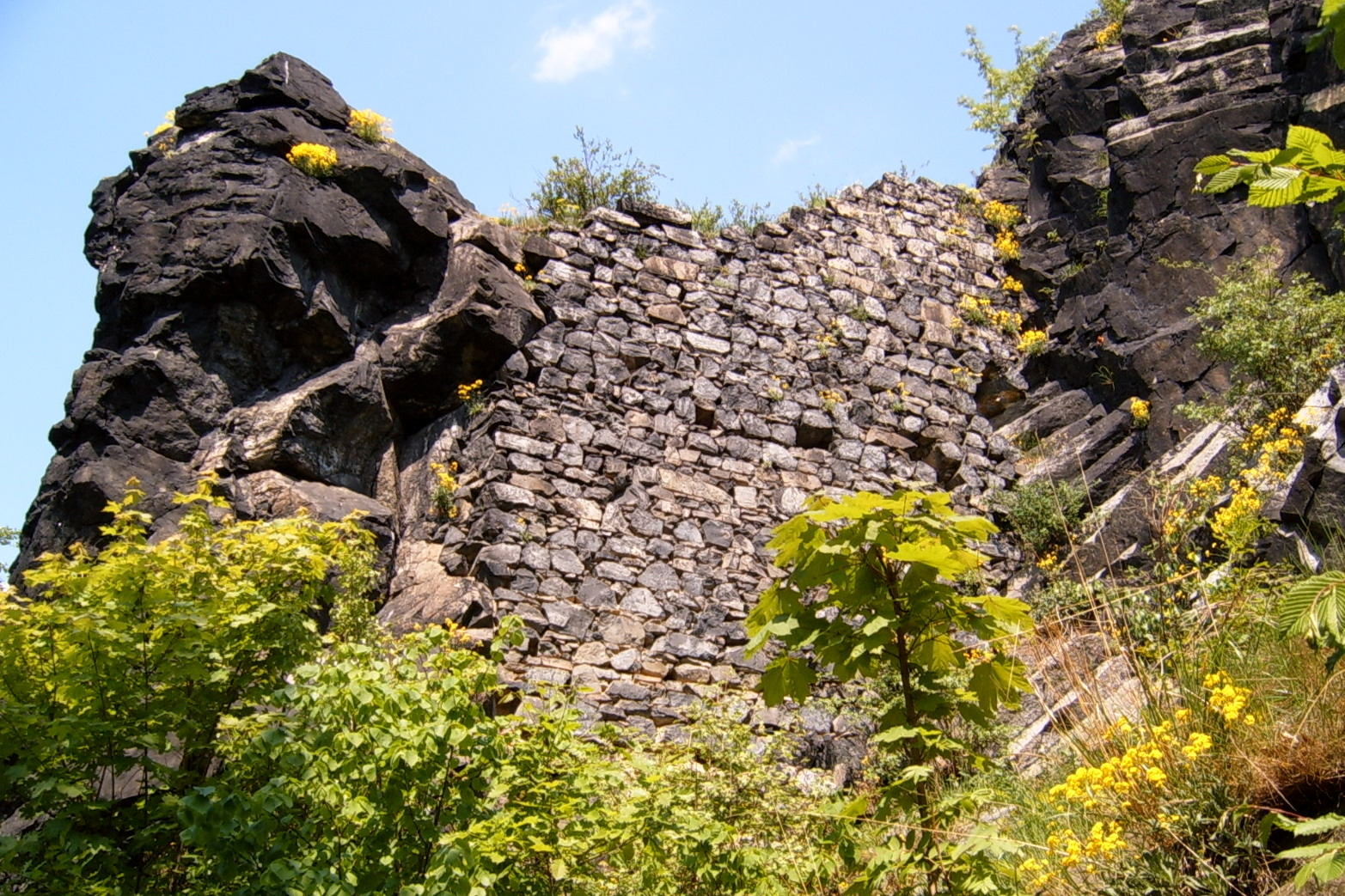 Fragment zdiva, Hrad Vrabinec, Babětín.